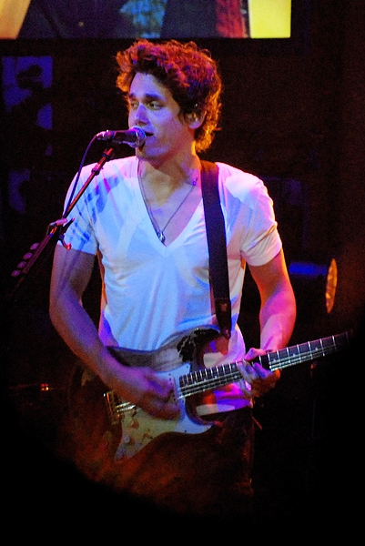 John Mayer ao vivo